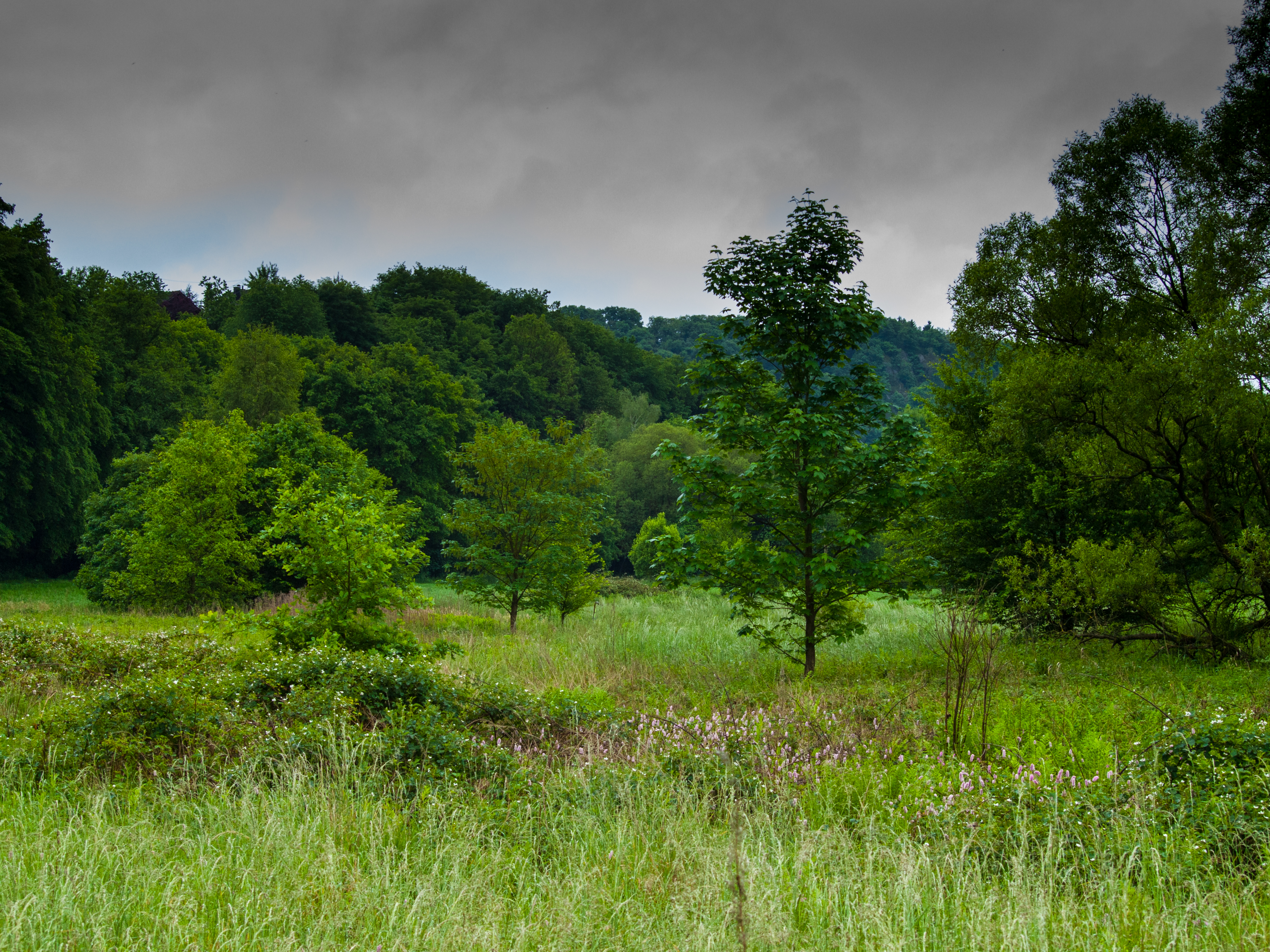 In der Graureiherkolonie, Naturschutzgebiet in der Nähe von Voßwinkel (Ortsgemeinde Mittelhof, Verbandsgemeinde Wissen), leider ohne Graureiher; Landkreis Altenkirchen (Westerwald), Rheinland-Pfalz